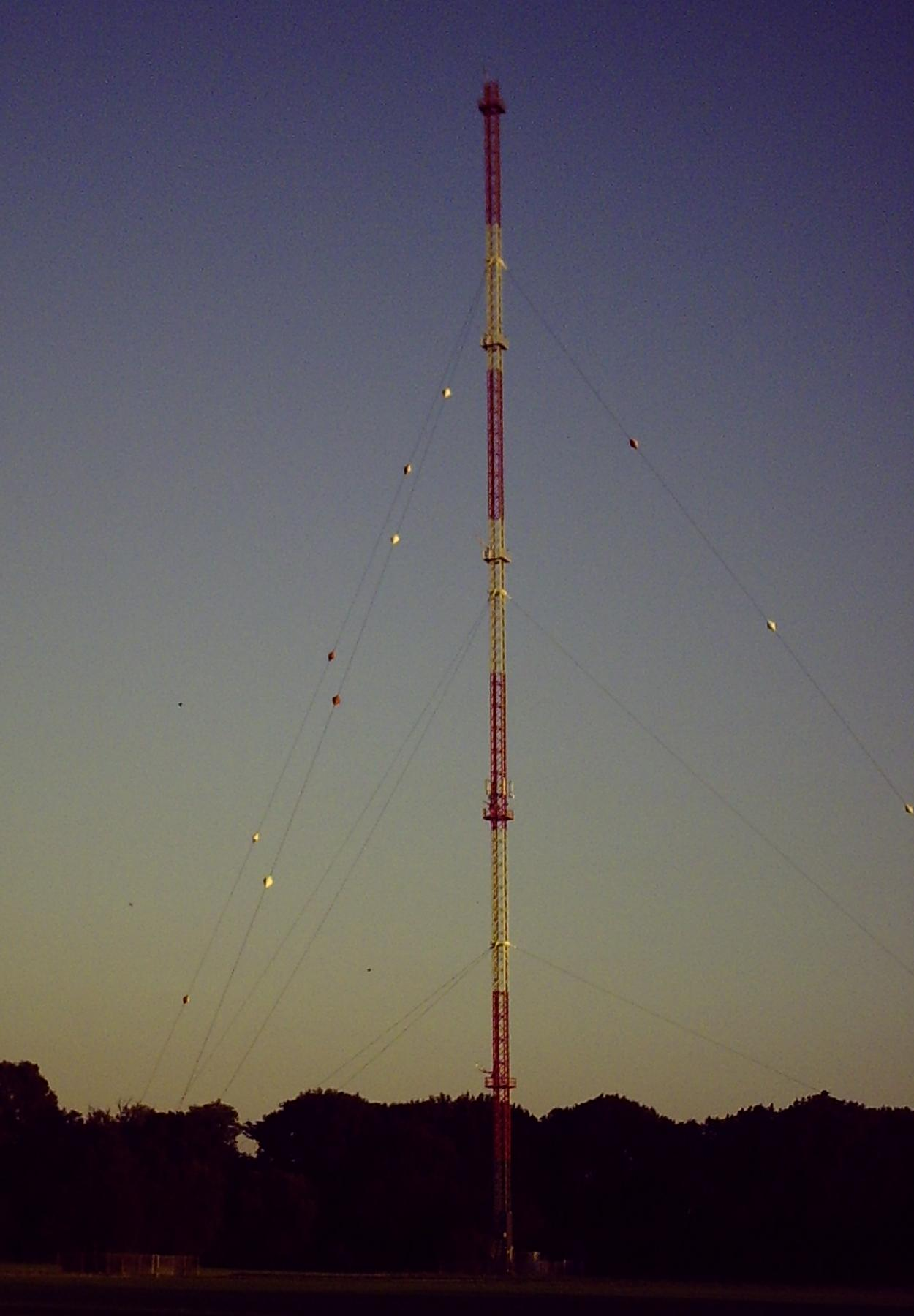 KFÜ-Mast beim Kernkraftwerk Grafenrheinfeld Ich habe dieses Bild selbst angefertigt und ich gestatte hiermit eine Verwertung des Bildes in der Wikipedia!